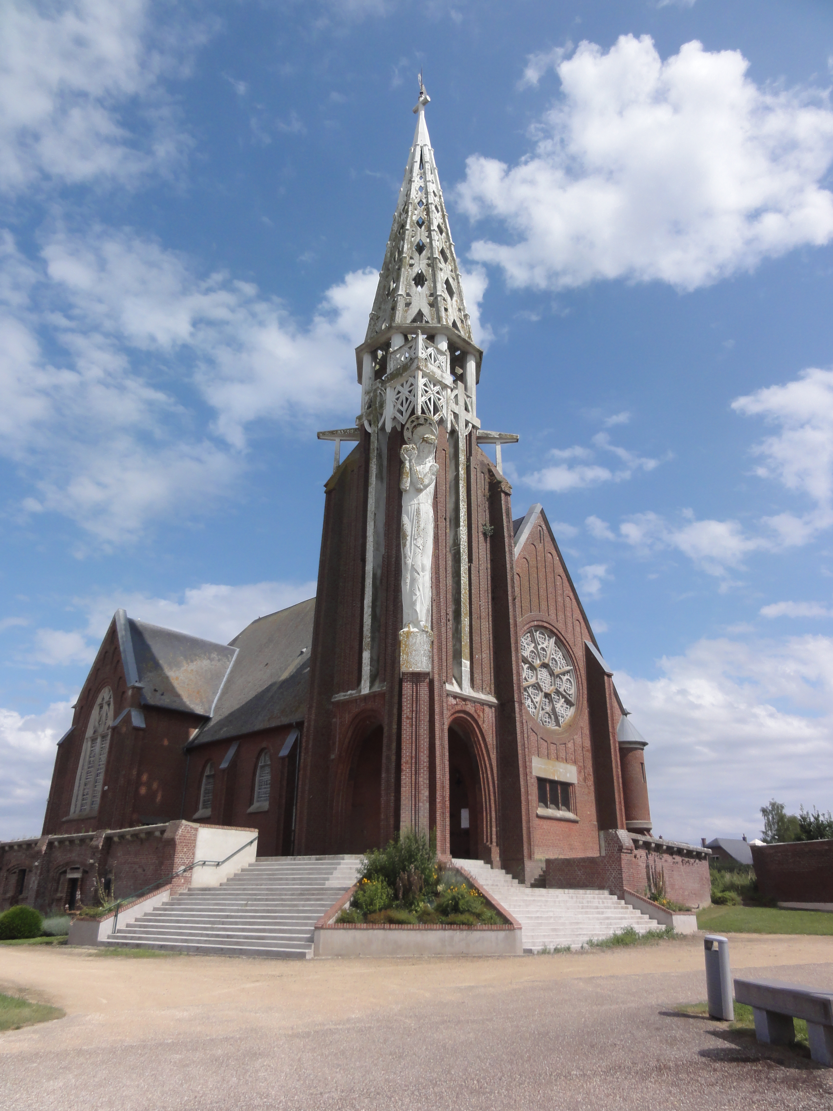 Jussy (Aisne) église Saint-Quentin